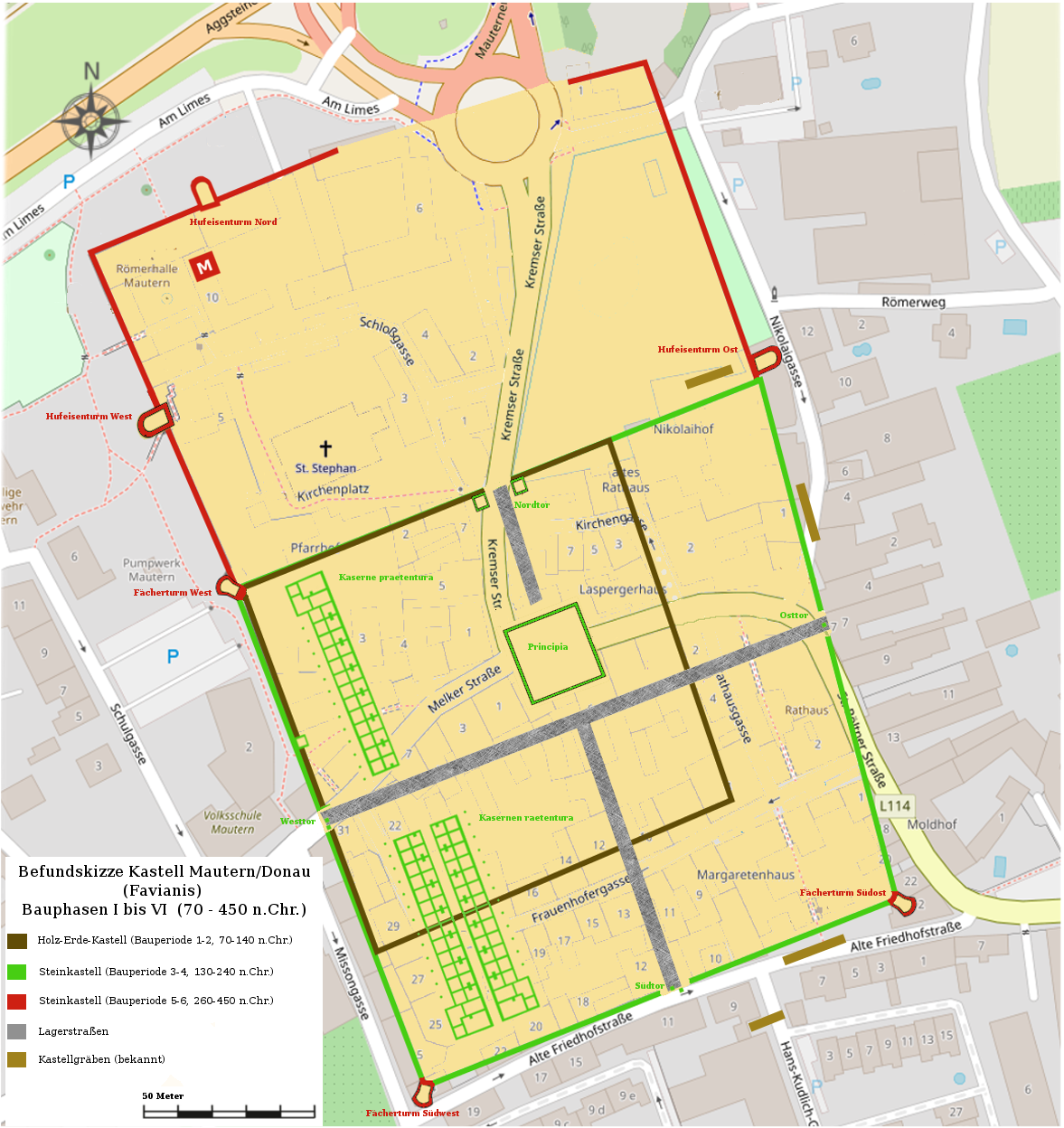 Befundskizze des Kastell Favianis (Mautern/Donau) in Österreich. Bauphasen 1-6 (80 bis 460 n.Chr.).